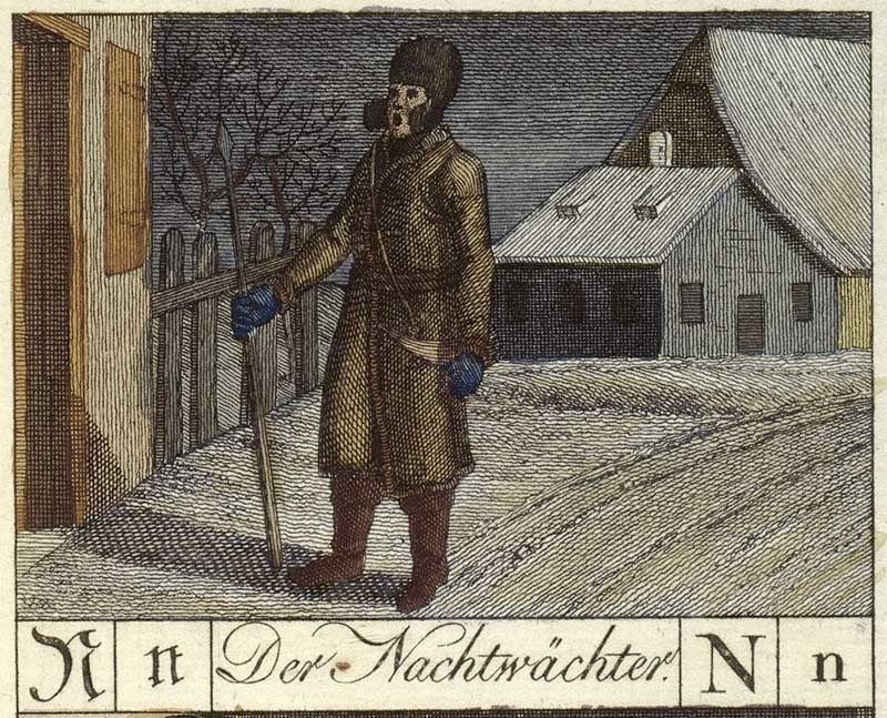 Nachtwächter. Aus: Neues Buchstabir- und Lesebuch : zur Beförderung der Entwiklung des Verstandes für niedere besonders aber für Landschulen, nebst einer kurzen Anweisung für Aeltern und Lehrer zum Gebrauch desselben. Mit acht illuminirten Kupfertafeln, welche die gemeinsten Giftpflanzen und Schwämme abbilden / Wolf, Johann. - Nürnberg, 1799 = [ca. 1799]. - Tafel VII